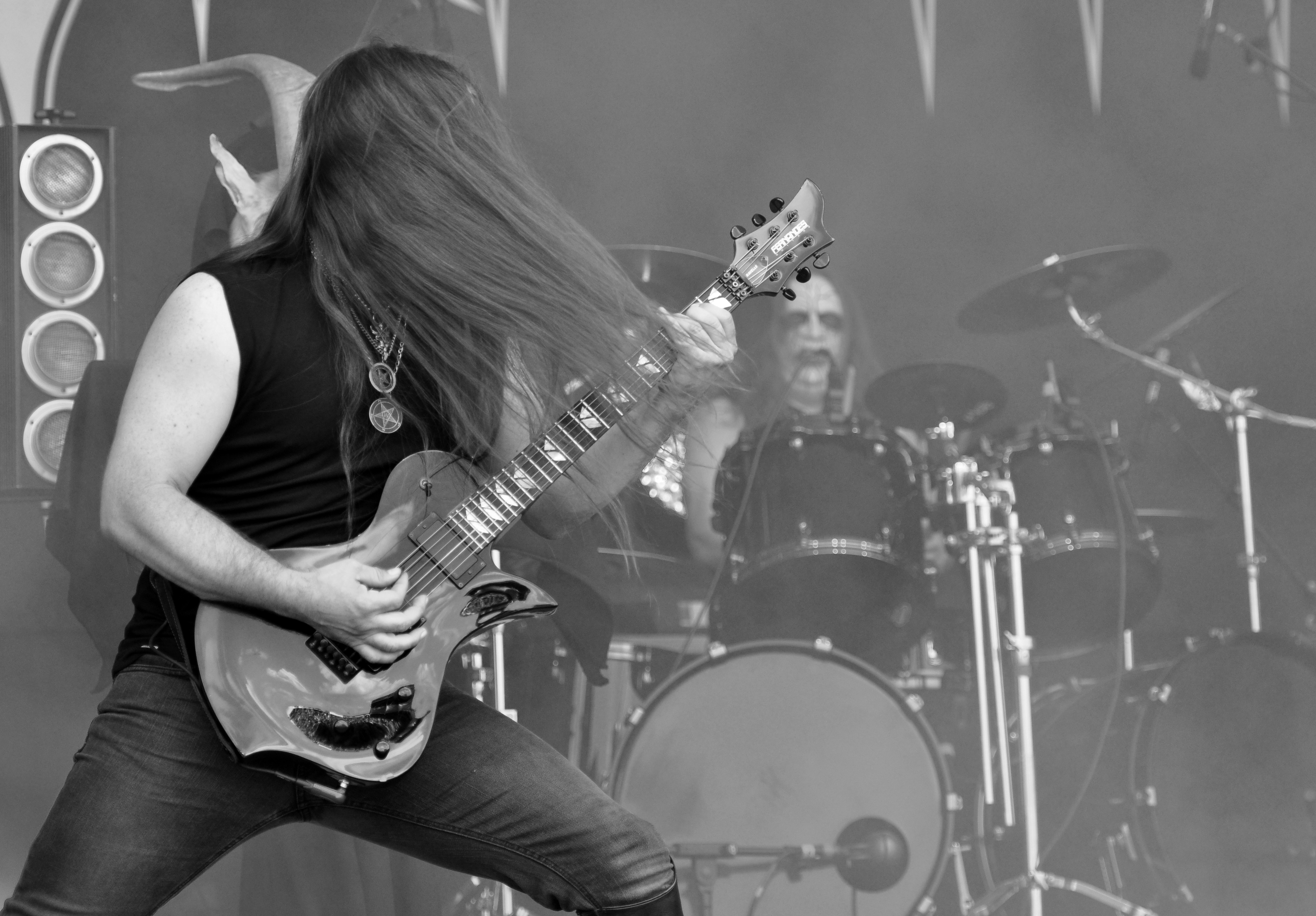 Inquisition, Party.San Open Air 2014